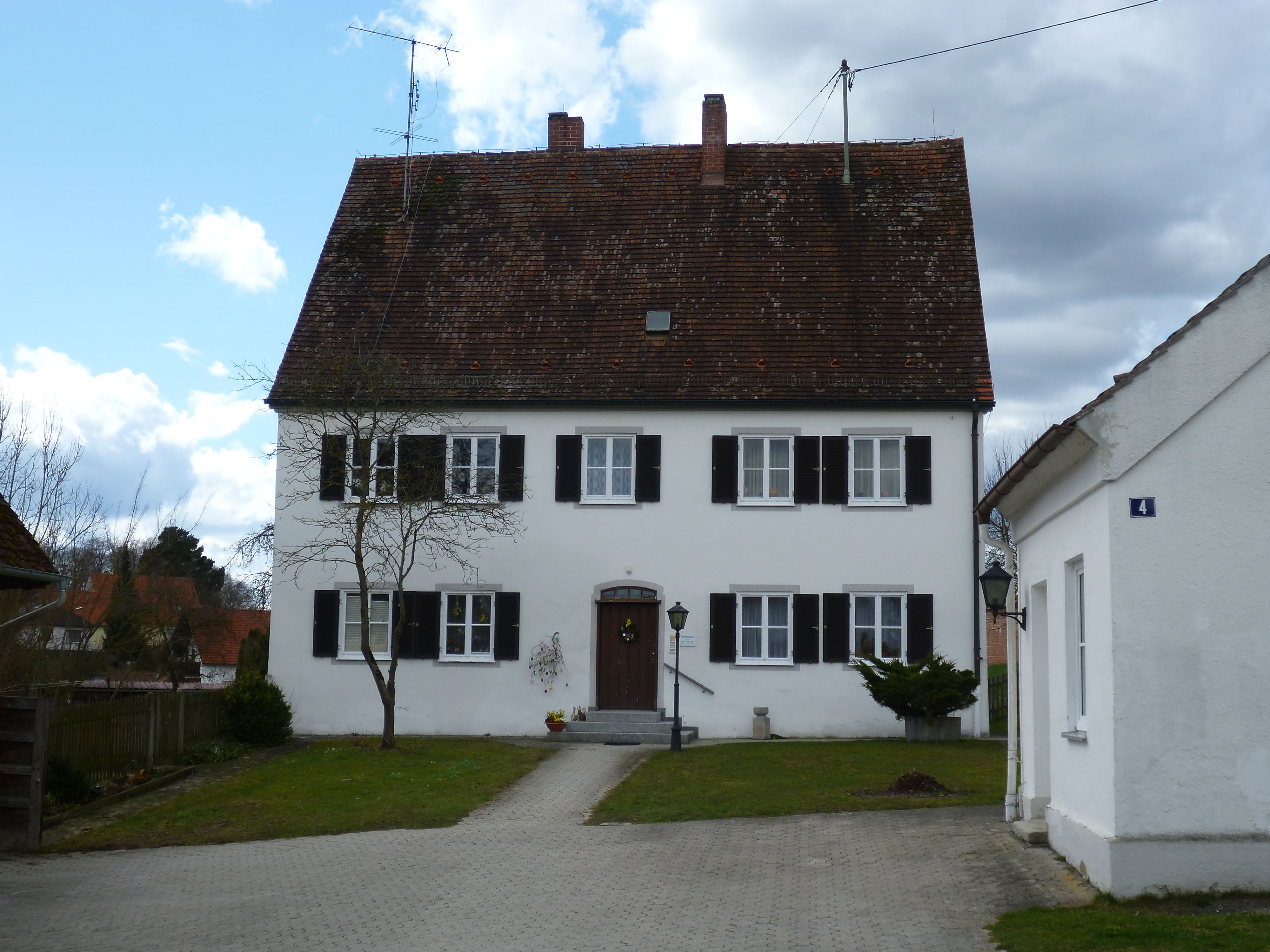 Pfarrhaus, massiver Satteldachbau, 1692, erneuert; Pfarrstadel, Steilgiebelbau mit Quertenne, 18. Jahrhundert